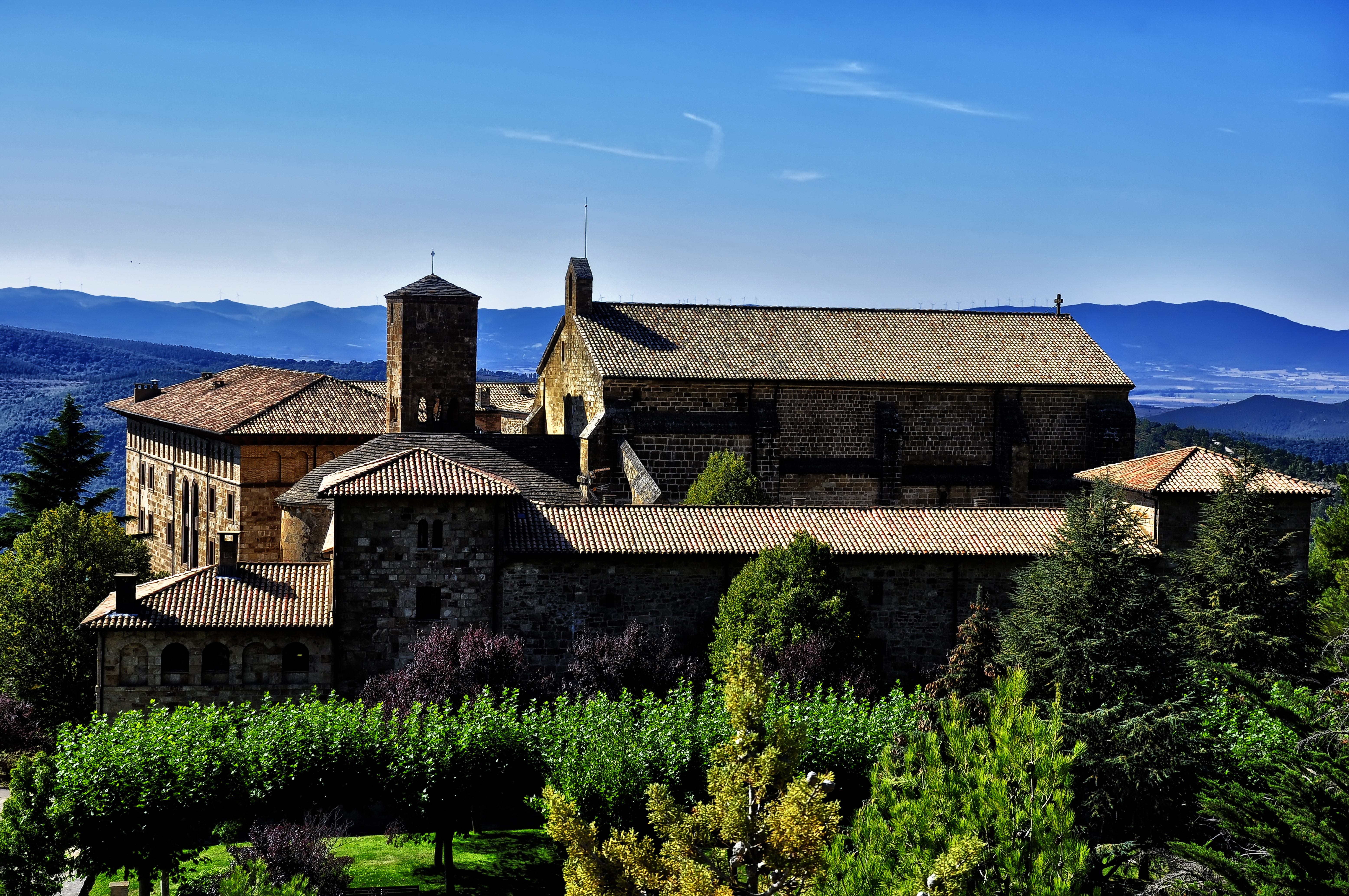 Monasterio de San Salvador de Leyre